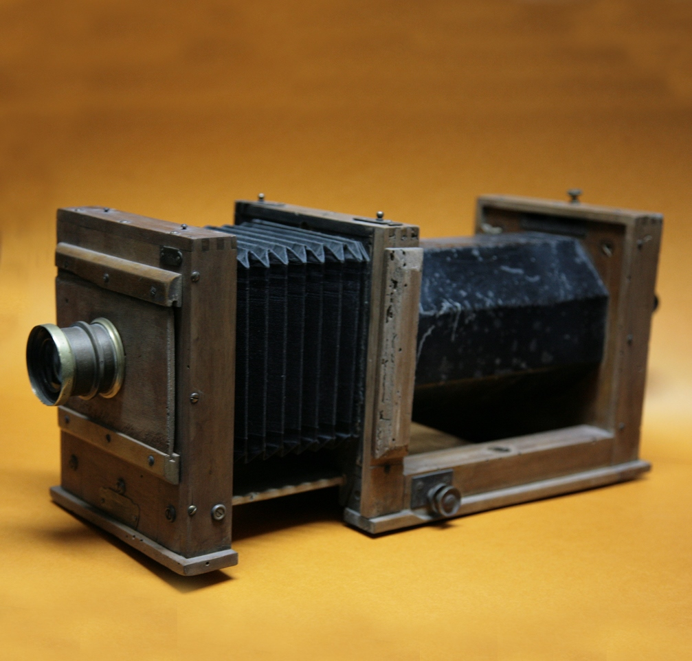 Coll. Marcè - Ingranditore Siluro di Tortona degli inizi 900